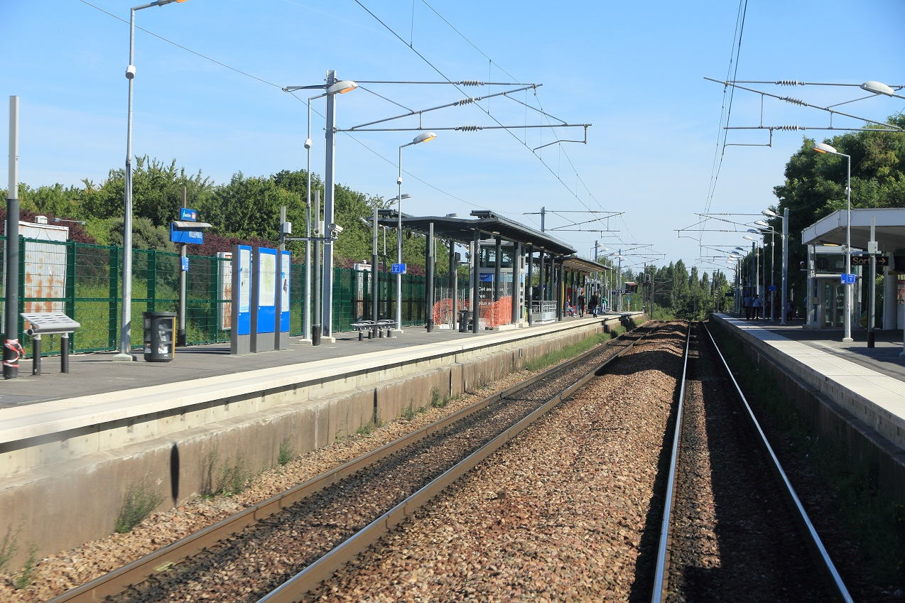 Vue générale de la gare de Villepinte en direction de Paris en juillet 2012, Ile-de-France, France.